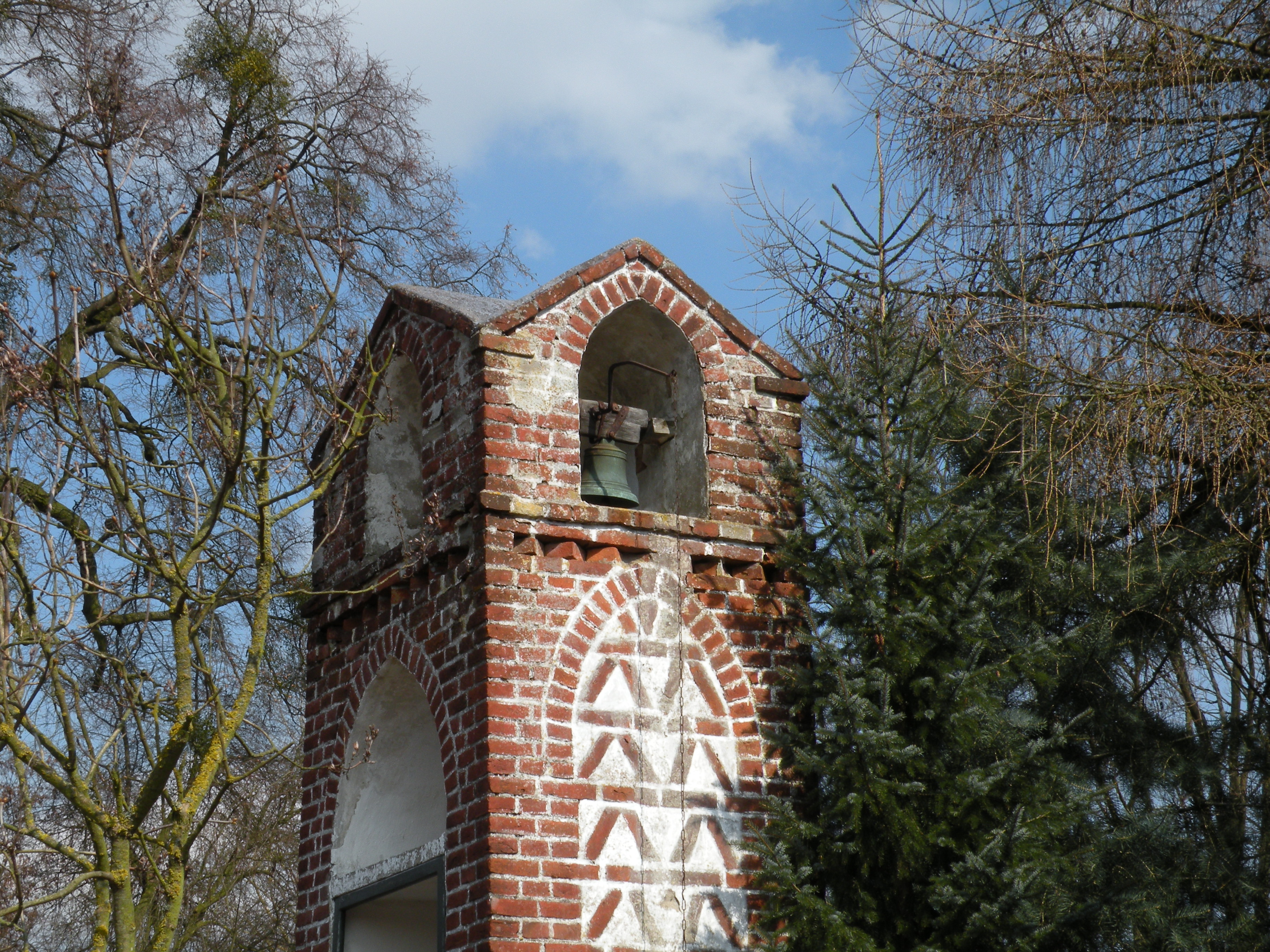 Kajny, większa kapliczka z dzwonkiem